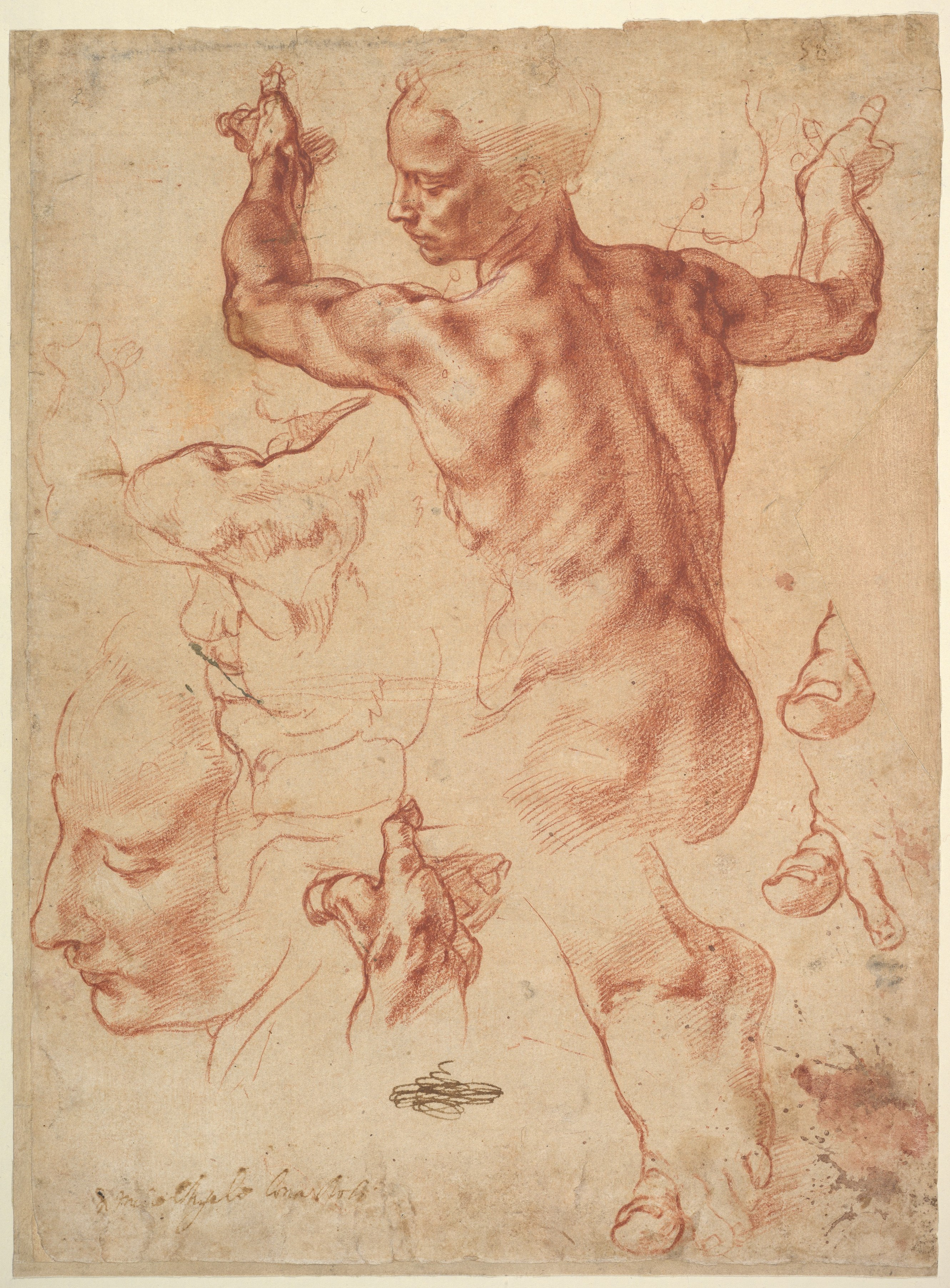 Drawing; Drawings